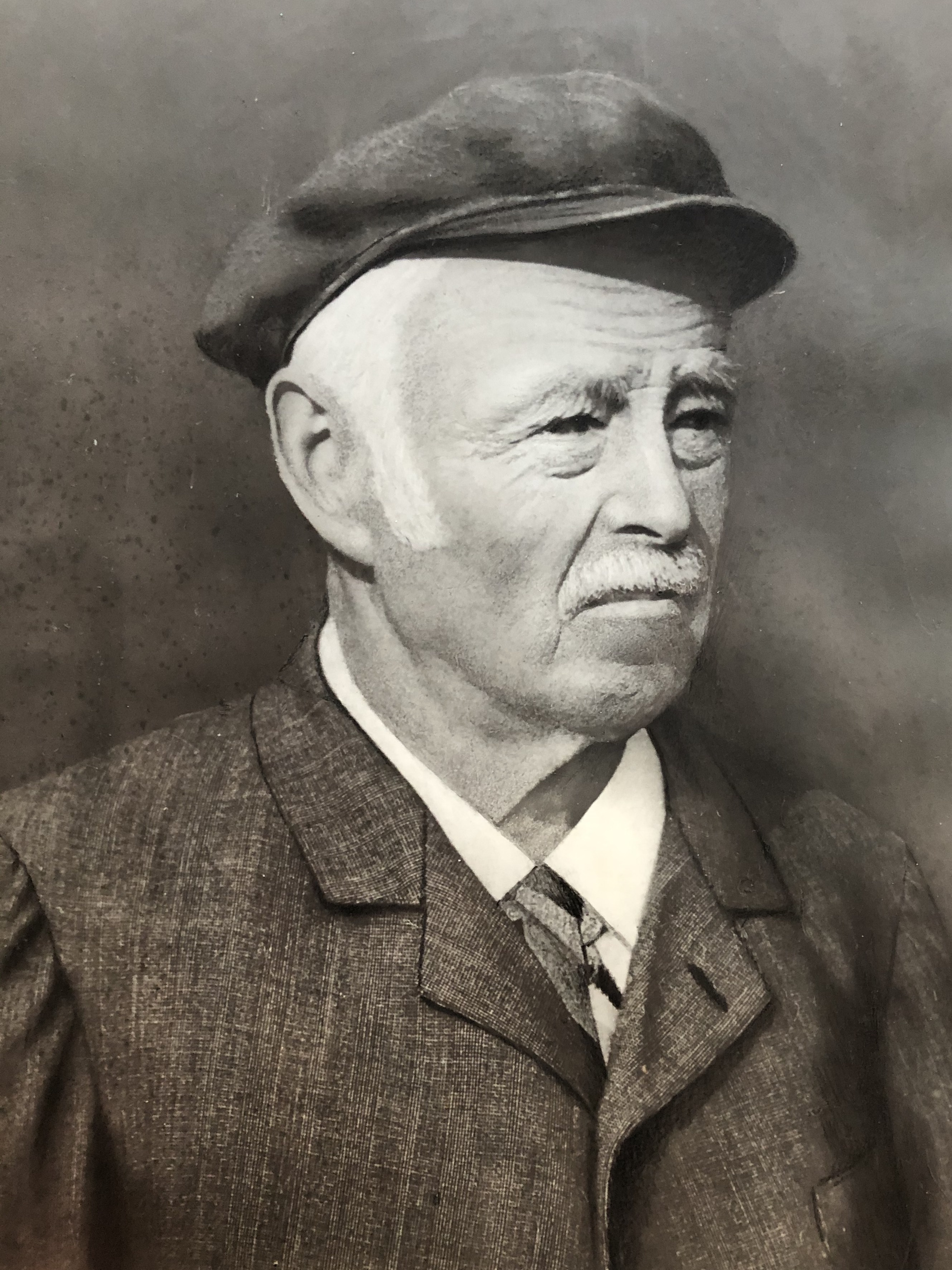 Gugger (Zollikon): Major Hans Heinrich Ernst (1842-1923), der letze private Besitzer des Hinteren Guggers